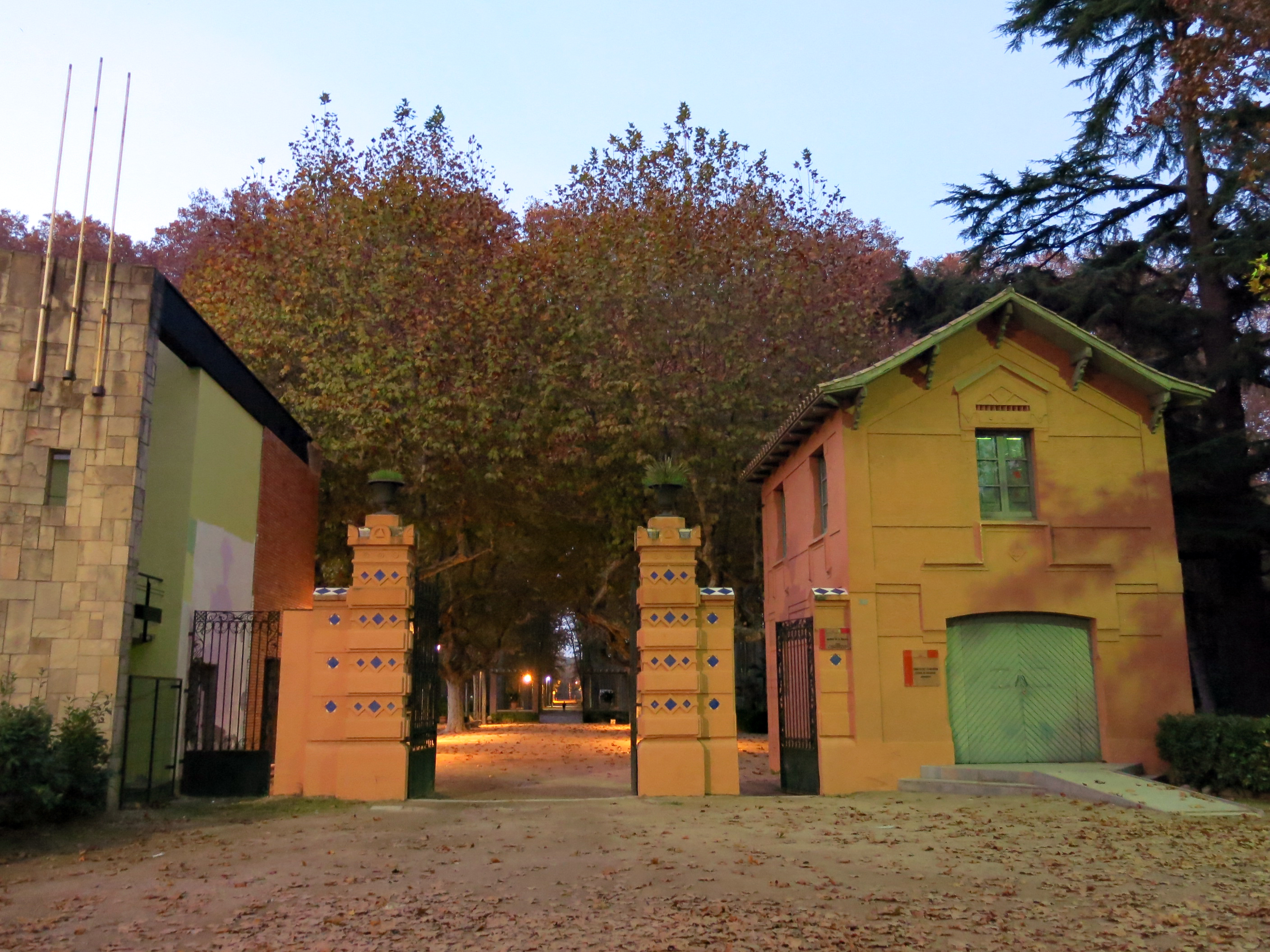 Parc de la Devesa (Girona)